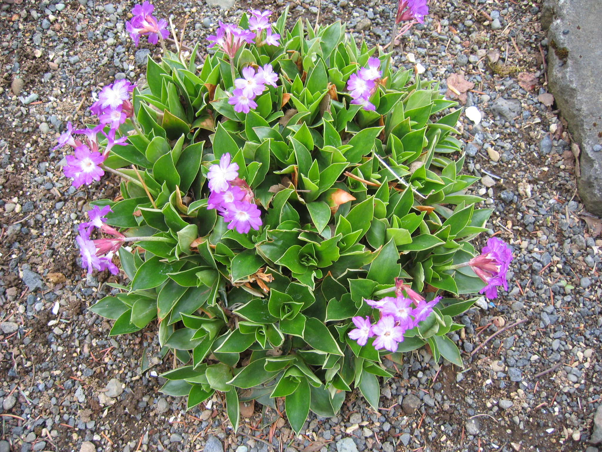 photo taken by Salvör in Grasagarður Reykjavíkur Botanical garden in Reykjavik, Iceland.